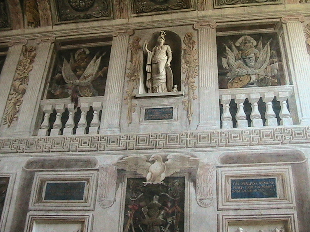 Vho di Piadena - Villa Magio Trecchi -Affreschi salone di ingresso